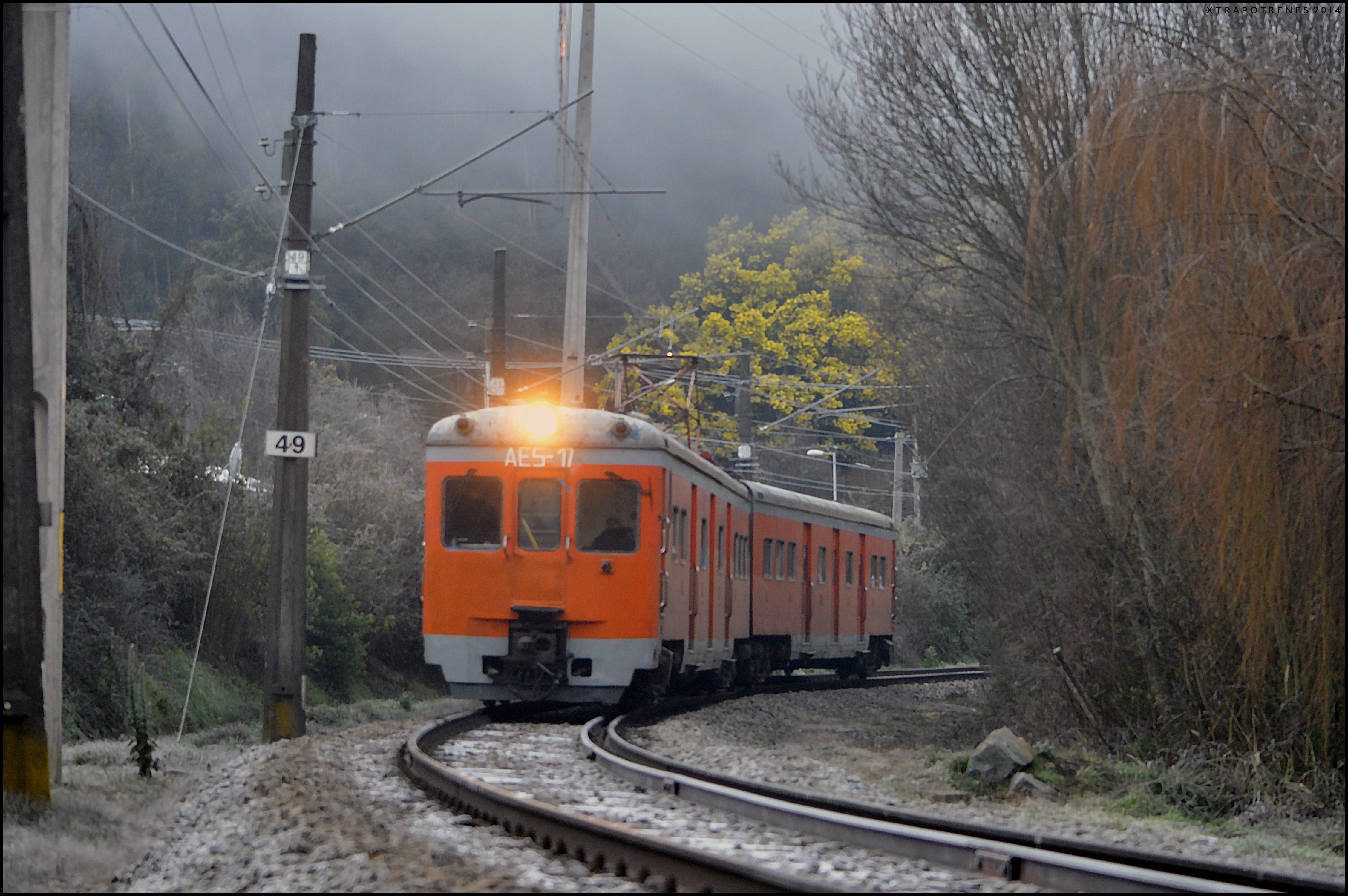 Tren de cercanías Corto Laja, con destino a Concepción, Chile